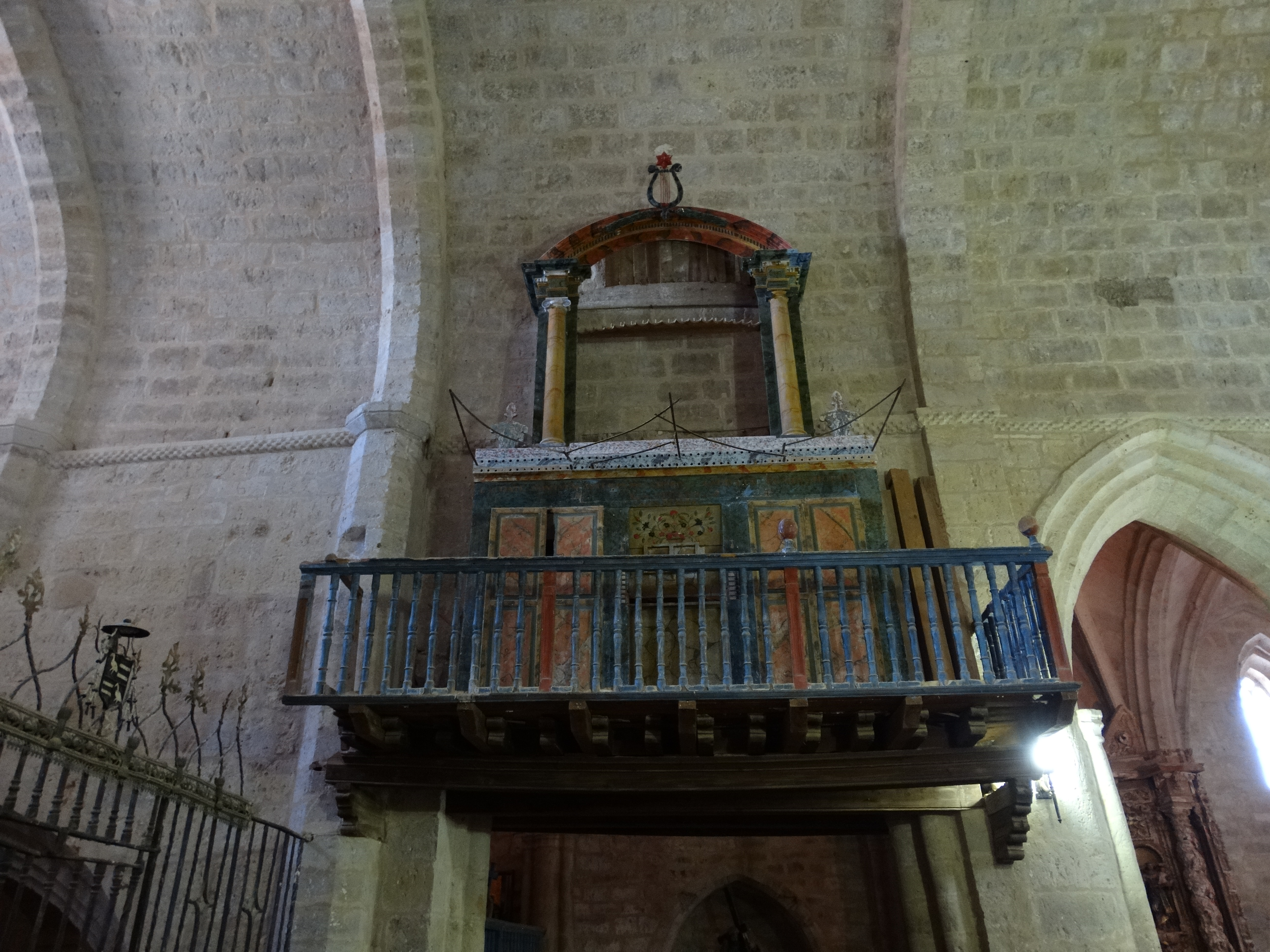 Torremormojón, provincia de Palencia, España. Iglesia de Santa María del Castillo. Órgano desmantelado por robo y a la espera de su reparación.